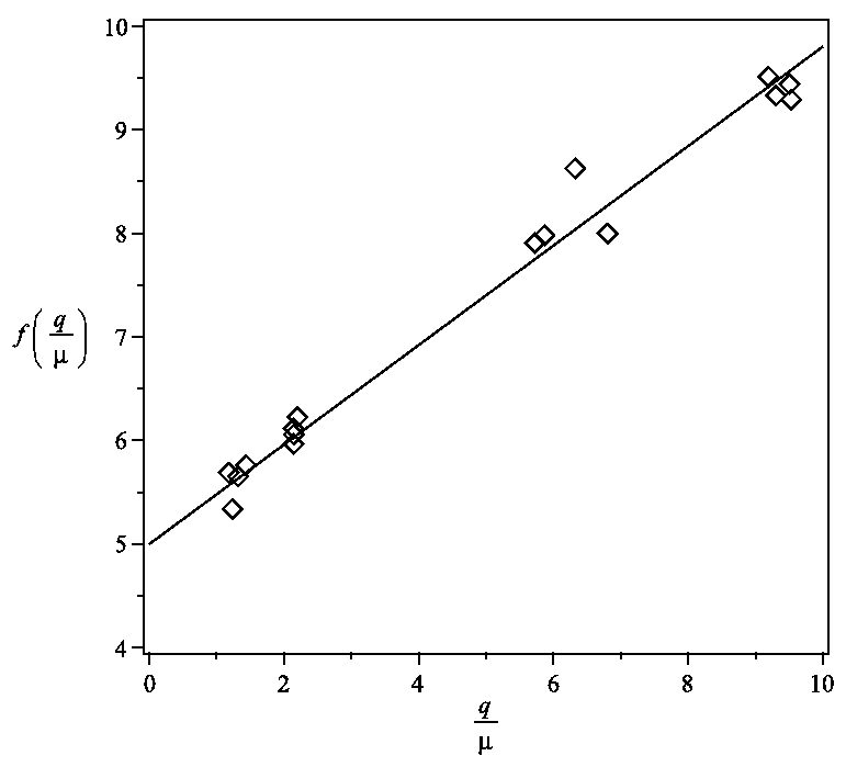 Porosity and Ward number measurement using Cornell and Katz method.